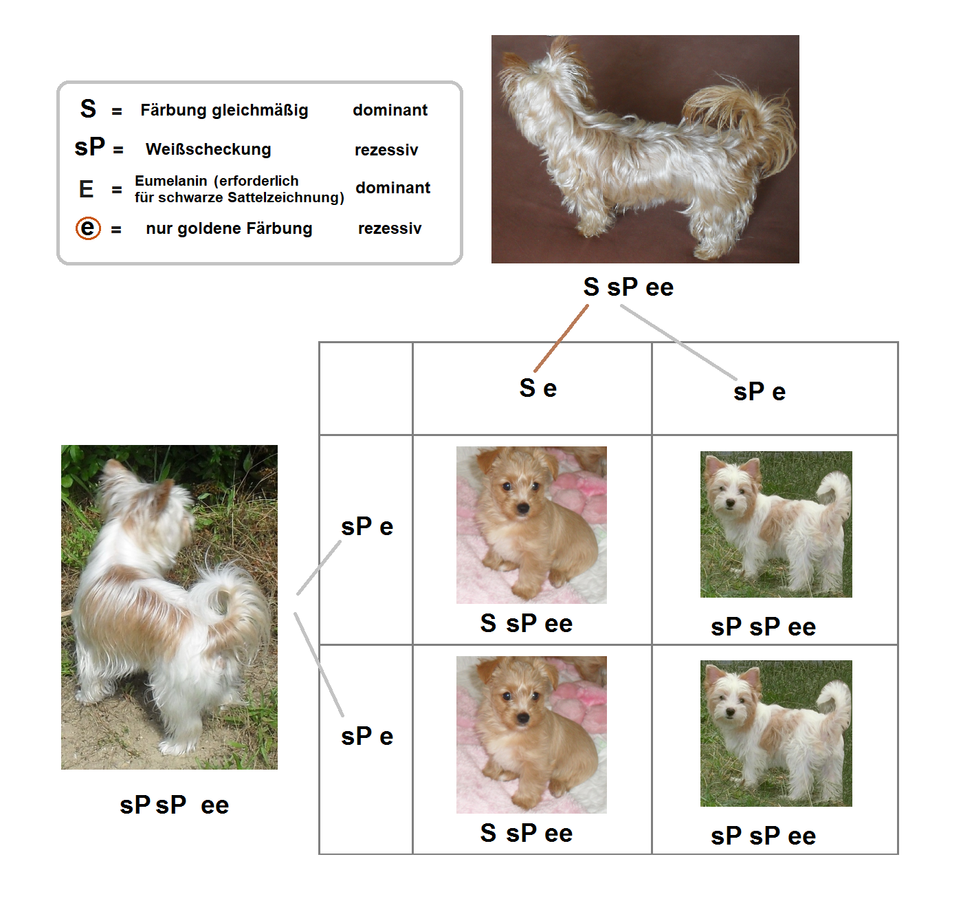 Erbschema: Verpaarung eines Golden Yorkshire Terrier mit einem Golddust